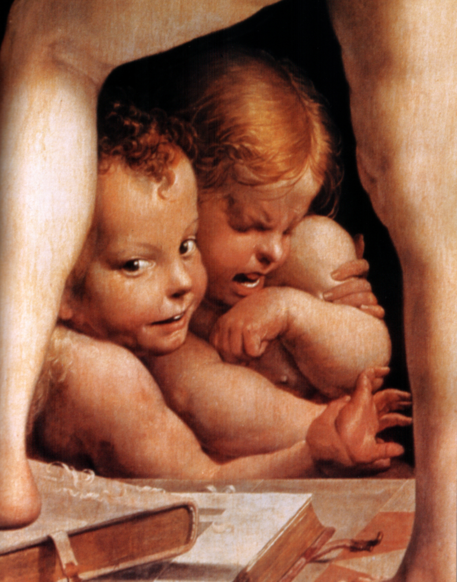 detail